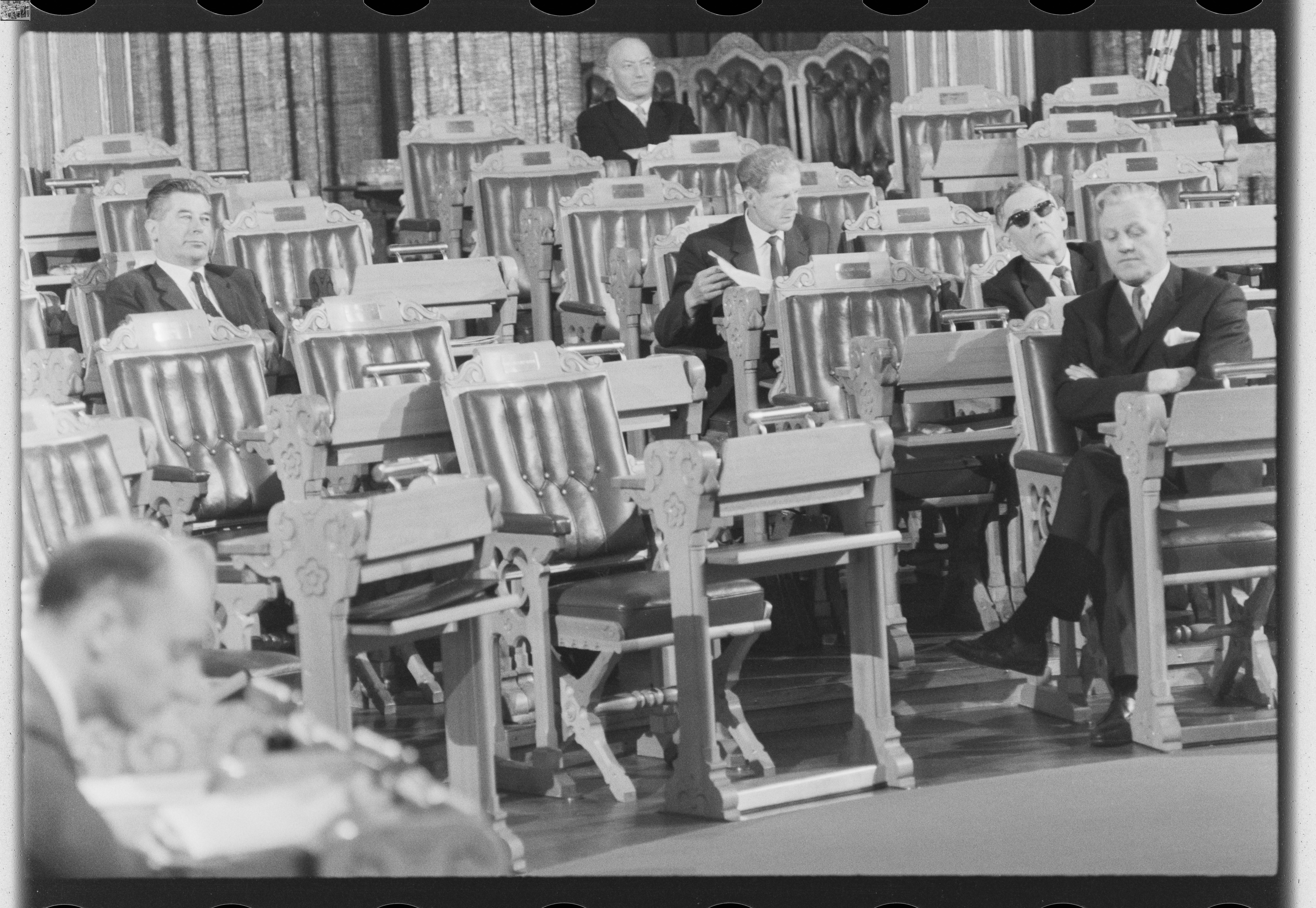 Bildet er hentet fra Arkivverket. Regjeringen Lyngs siste dag, fra debatten i Stortinget Arkivinstitusjon : Riksarkivet Arkivnavn : Billedbladet NÅ Sted : Norge, Oslo, Oslo, Stortinget Emneord: Regjeringer, Lyng Avbildet